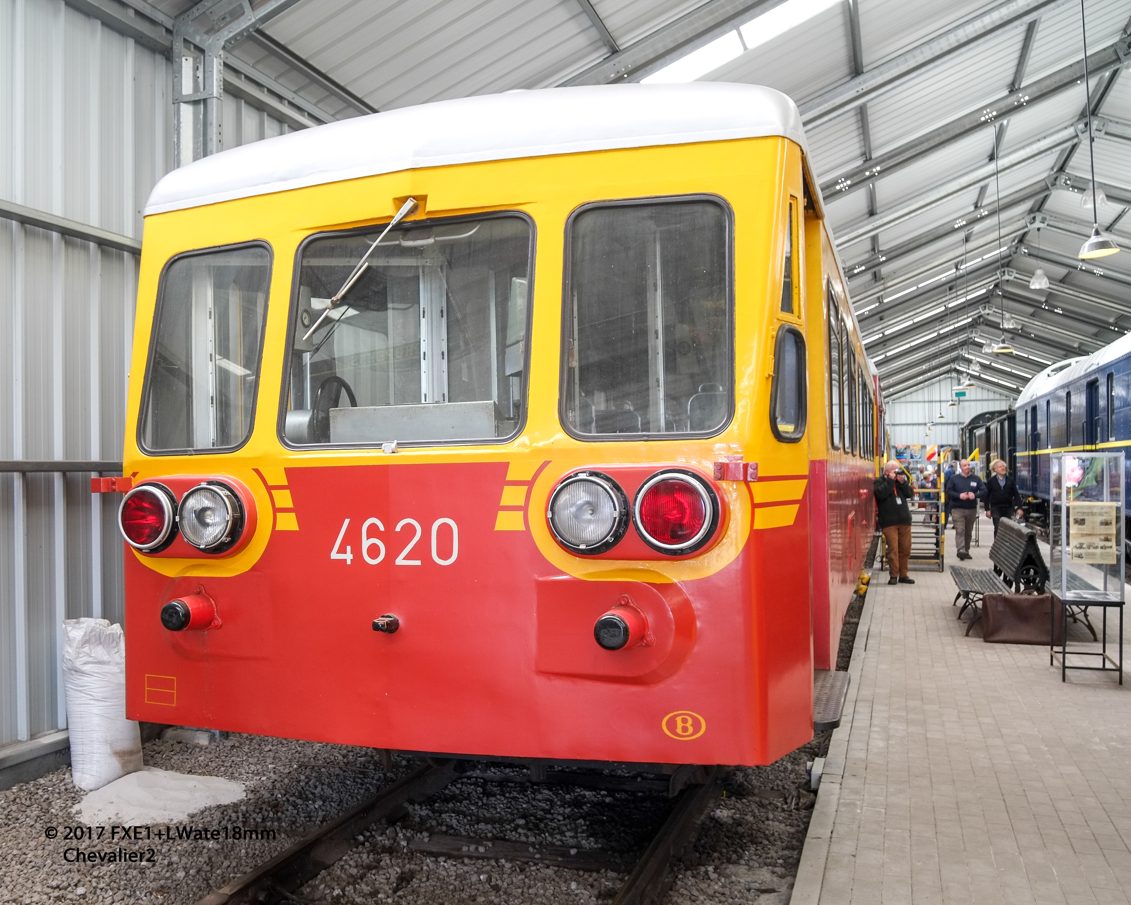 Autorail 4620